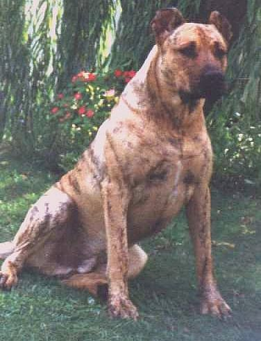 Perro Cimarron, Cimarron, Cimarron Uruguayo, Perro Criollo, Perro Gaucho